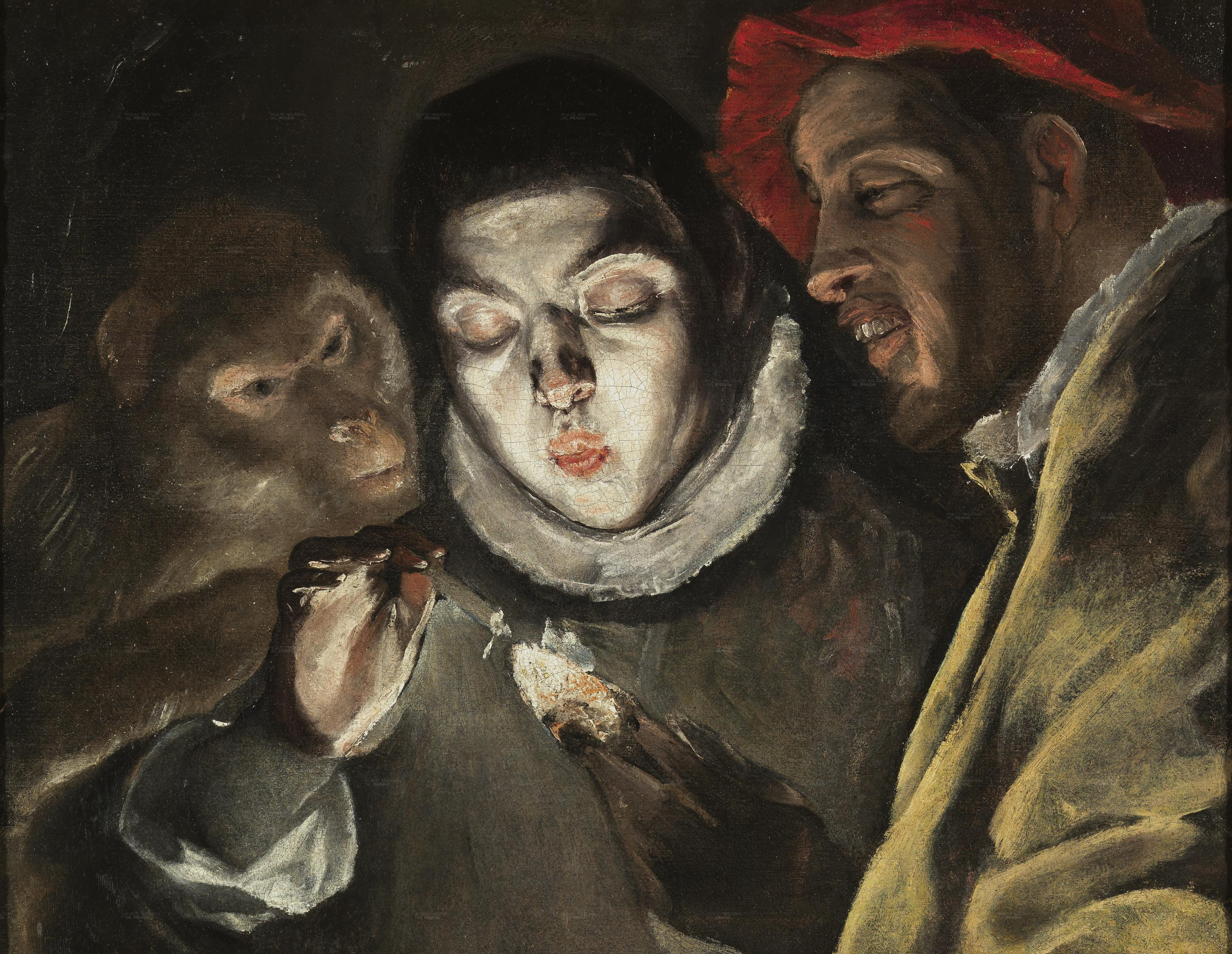 En esta obra aparecen tres personajes junto a un tizón encendido, siendo uno de ellos el muchacho que lo tiene en su mano y que sopla para avivarlo, otro un hombre que sonríe y el tercero un mono encadenado que sopla con expresión concentrada.